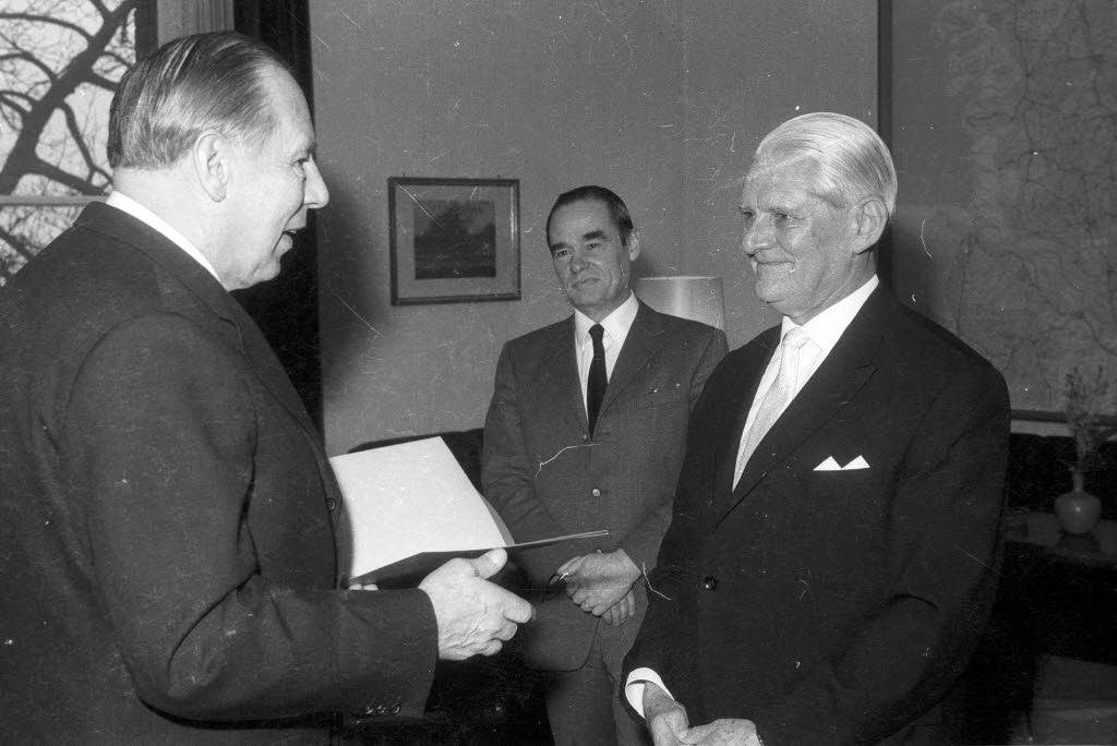 Ministerpräsident Helmut Lemke (links) überreicht dem Direktor des Historischen Seminars der Christian-Albrechts-Universität (CAU) das Große Verdienstkreuz des Verdienstordens der Bundesrepublik Deutschland. Im Hintergrund Kulturstaatssekretär Reinhold Borzikowsky.